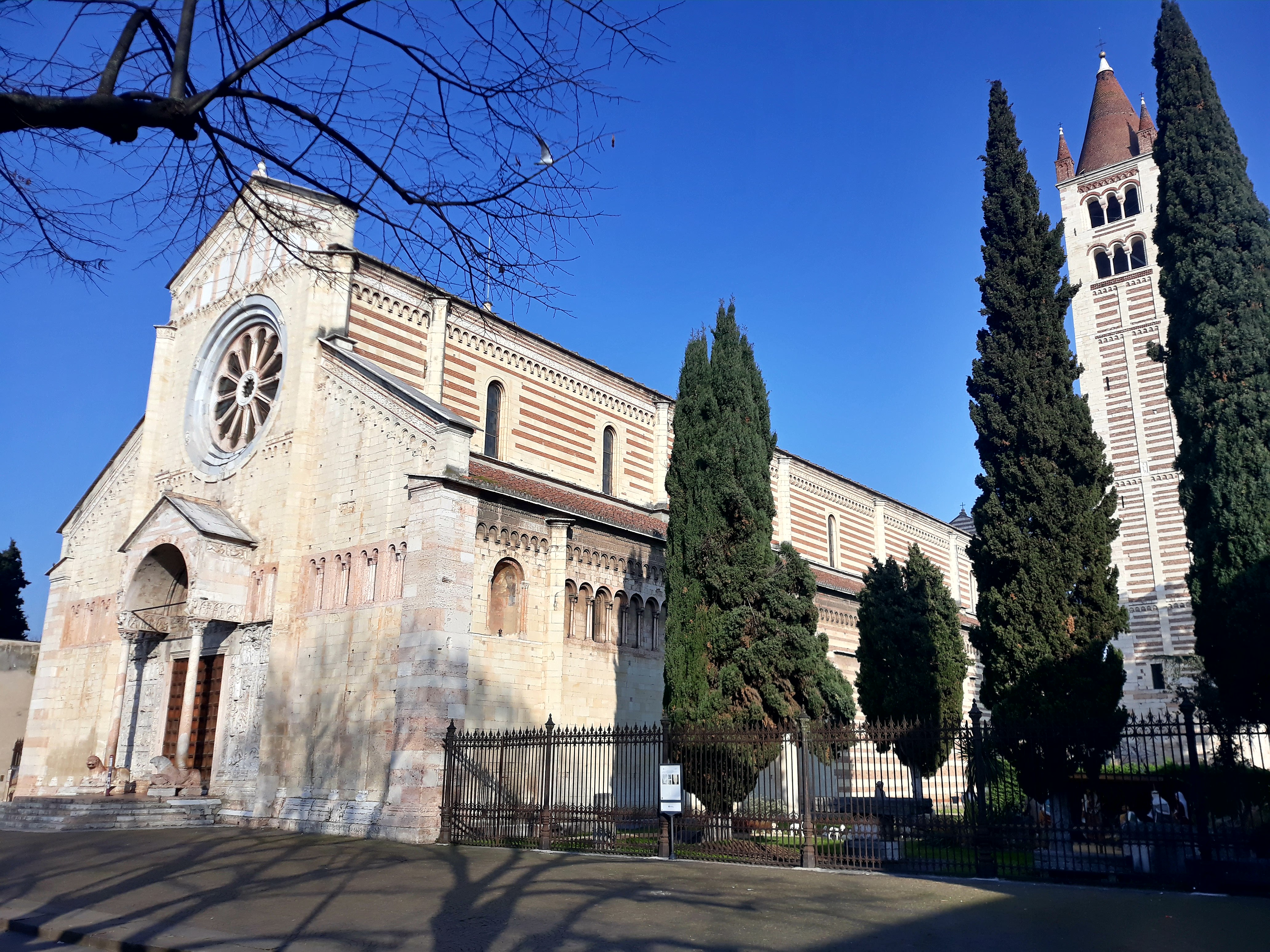 Fianco meridionale della basilica di San Zeno a Verona